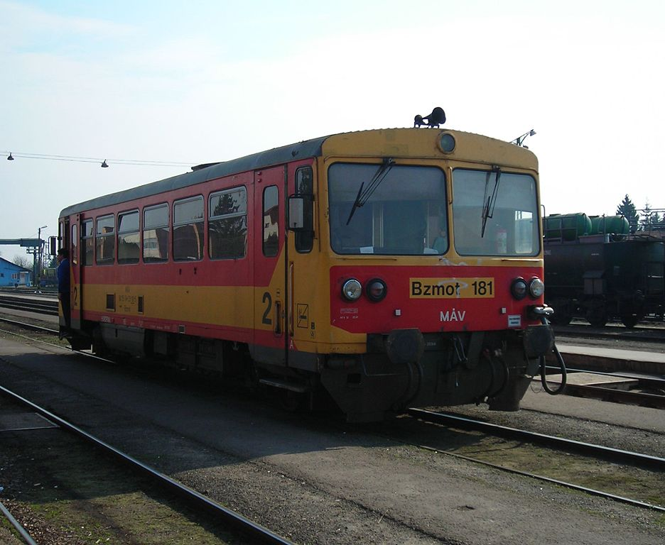 Bzmot motorvonat Balassagyarmat állomáson